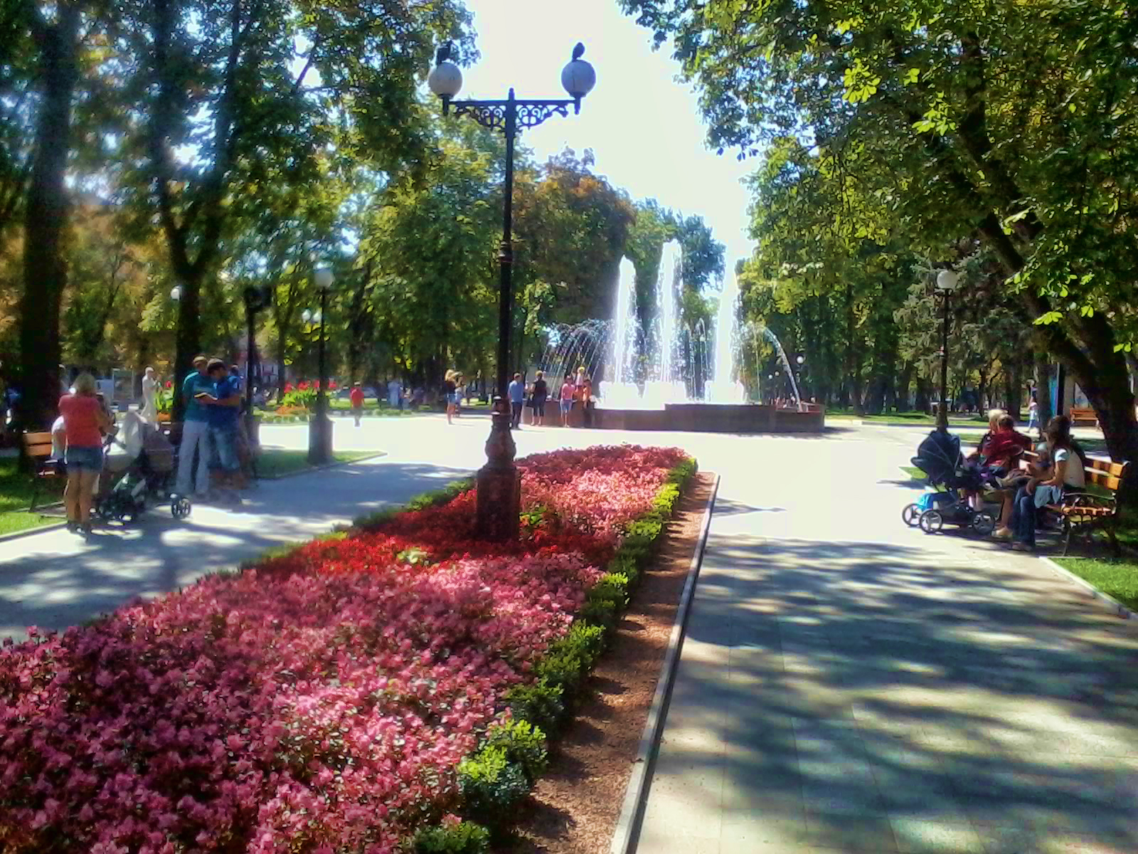 Жовтневий сквер у Кременчуці після реконструкції